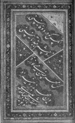 خط نستعلیق علیرضا عباسی چاپ شده در ماهنامه هنر و مردم خرداد ۱۳۴۳